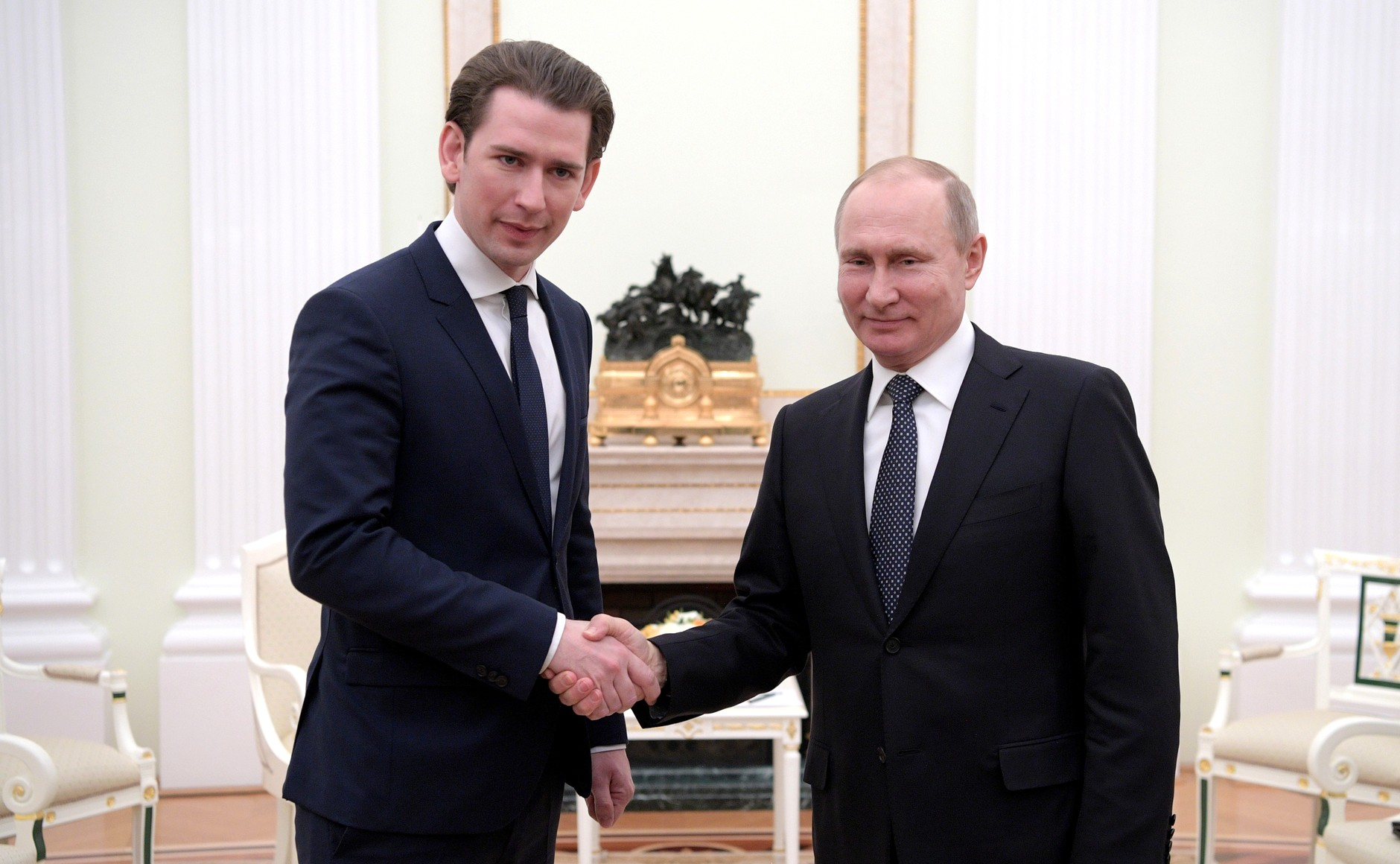 Встреча Президента России Владимира Путина с Федеральным канцлером Австрии Себастианом Курцем